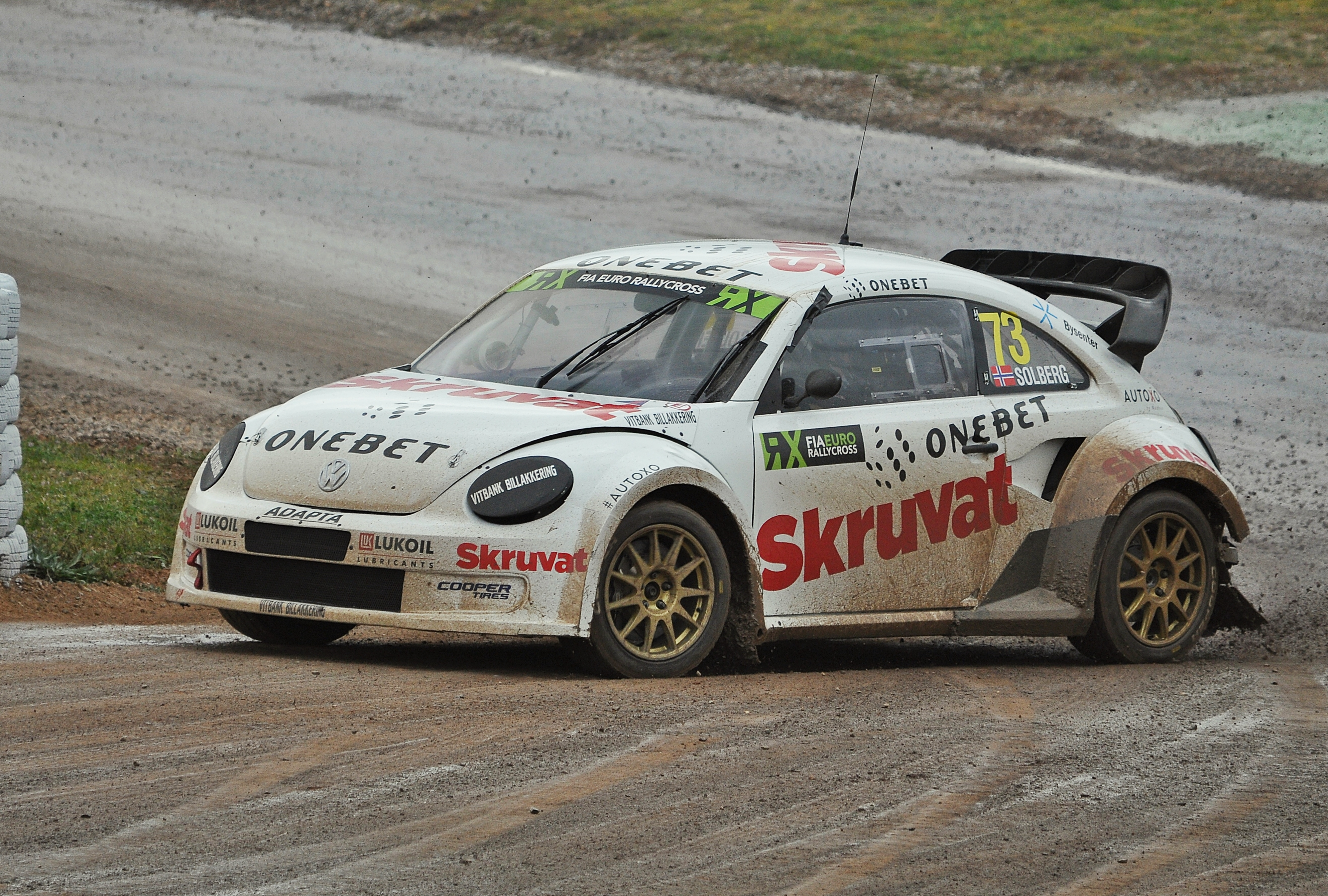 RX Barcelona